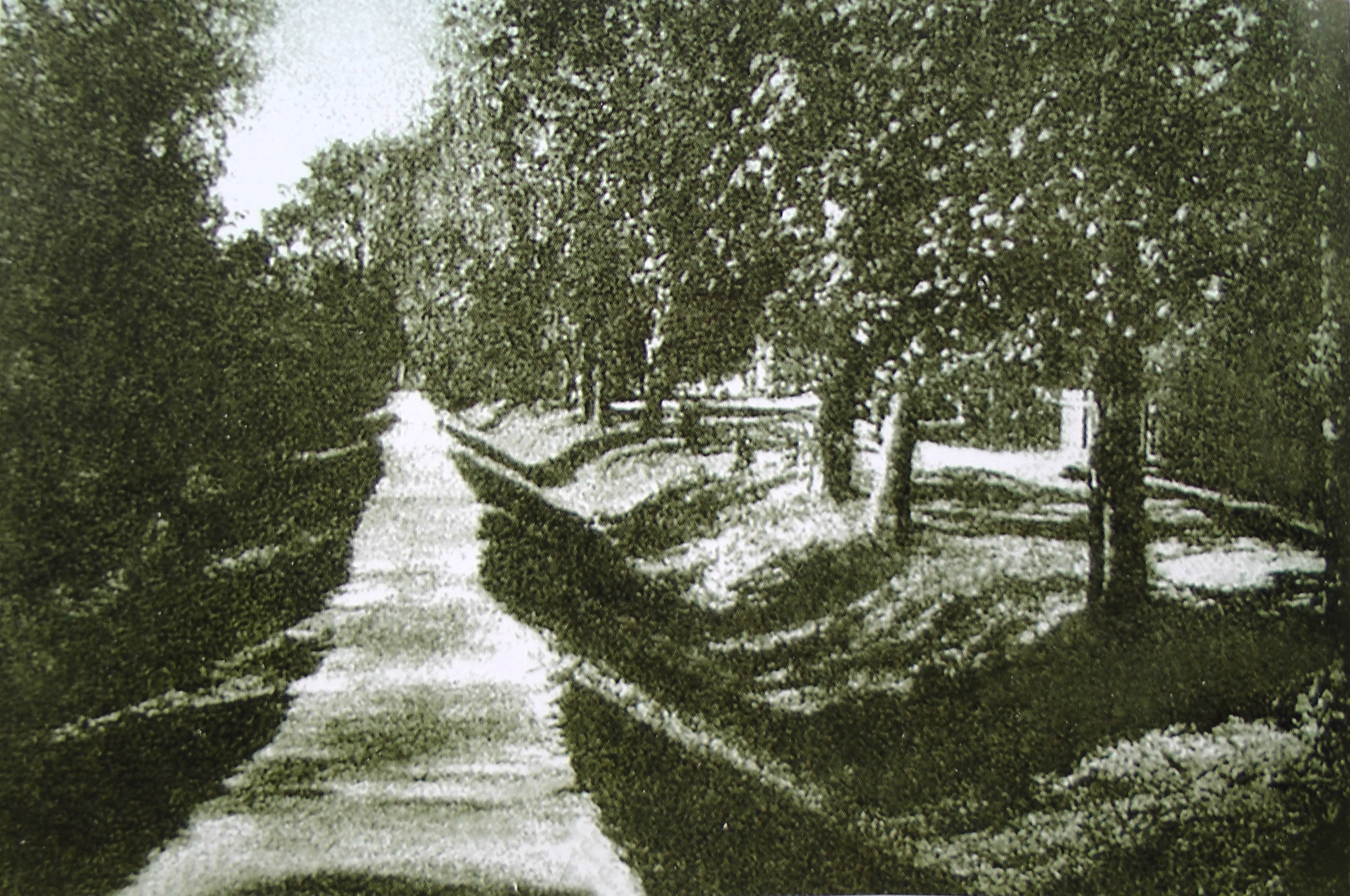 Неизвестный фотограф из Нижнего Новгорода. Святая Канавка в первые годы XX века